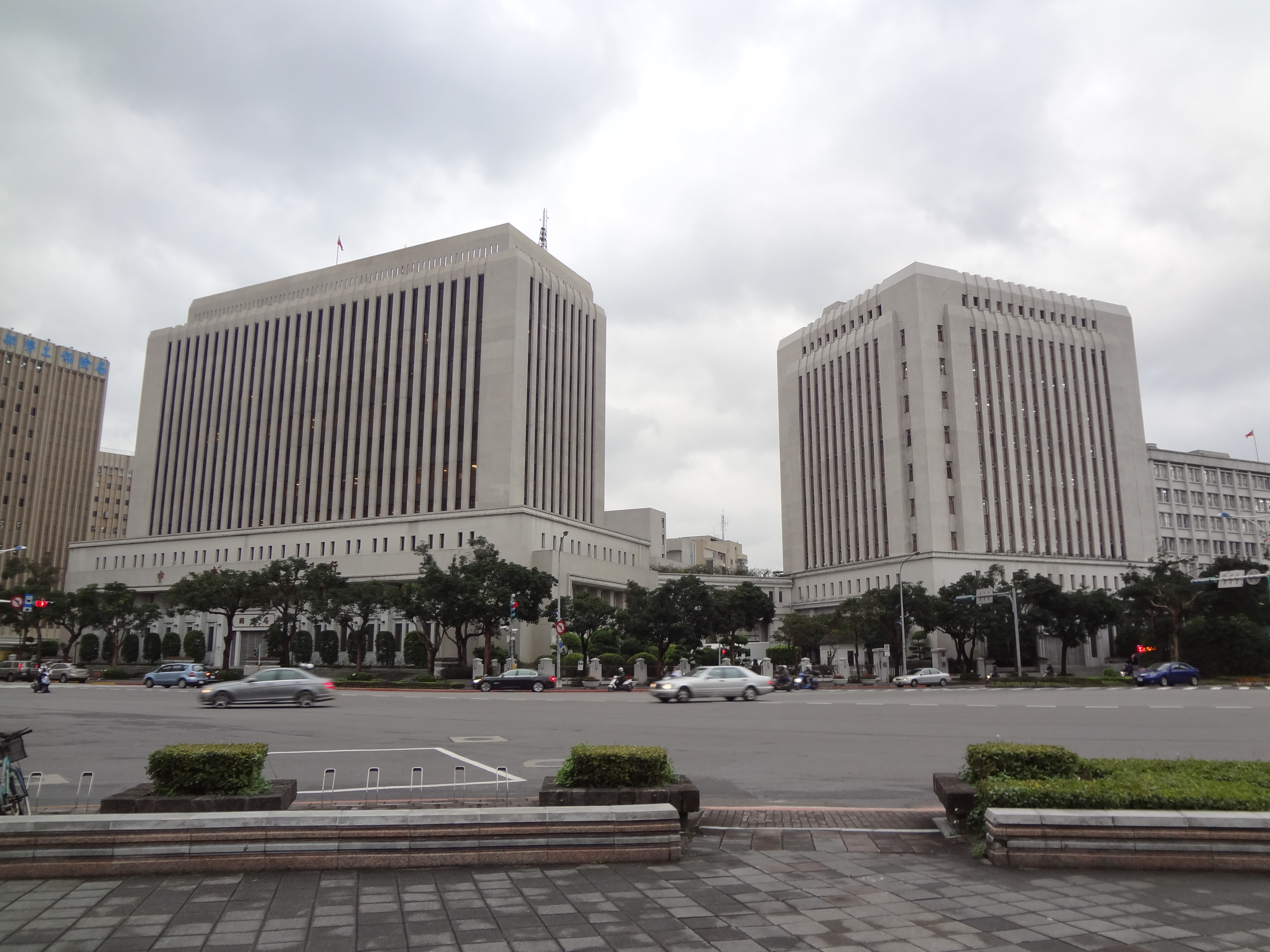 中華民國中央銀行，地址：臺北市中正區羅斯福路一段2號。